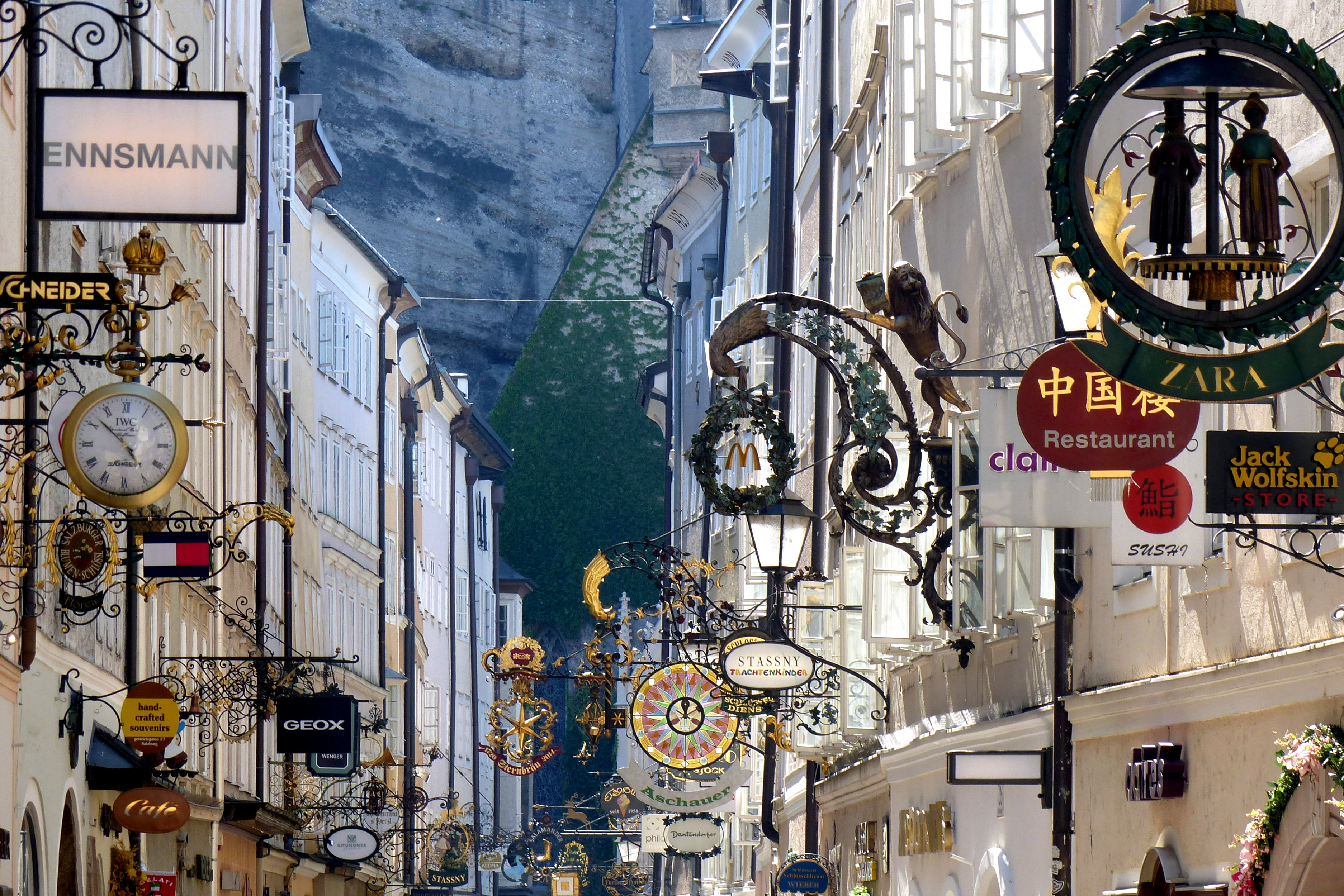 Die alte Gasse in Salzburg ist bekannt für ihre zahlreichen, teils kunstvollen Geschäfts- und Zunftschilder.